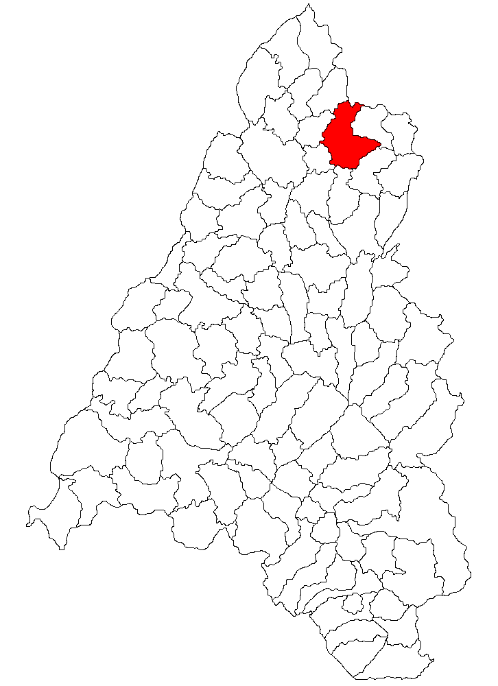 Categorie:Hărţi ale judeţului Bihor